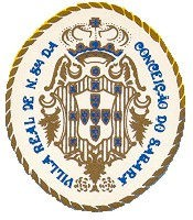 Brasão da cidade de Sabará Fonte